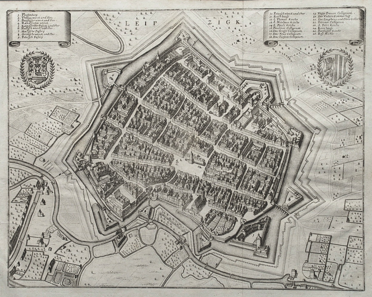 Merian, Matthäus d. Ä. (1593-1650): Leipzig Kupferstich (28 x 35,5 cm Plattenrand) aus "Topographia Superioris Saxoniae Thuringiae Misniae Lusatiae etc." Frankfurt: Hrsg. von Matthäus Merian 1650. Literatur: THIEME-BECKER Bd. 24, S. 413